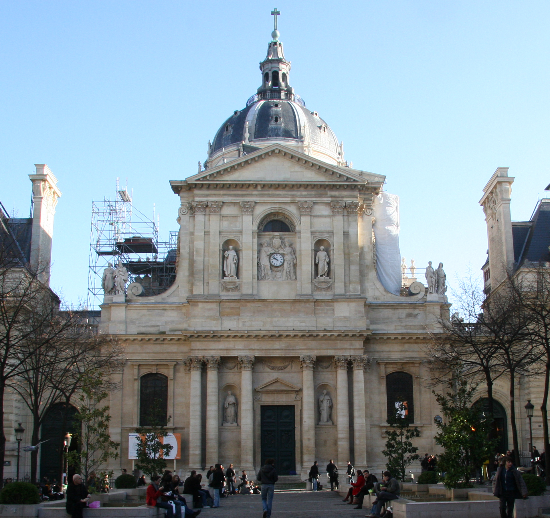 Chapelle Sainte-Ursule de la Sorbonne, Paris.